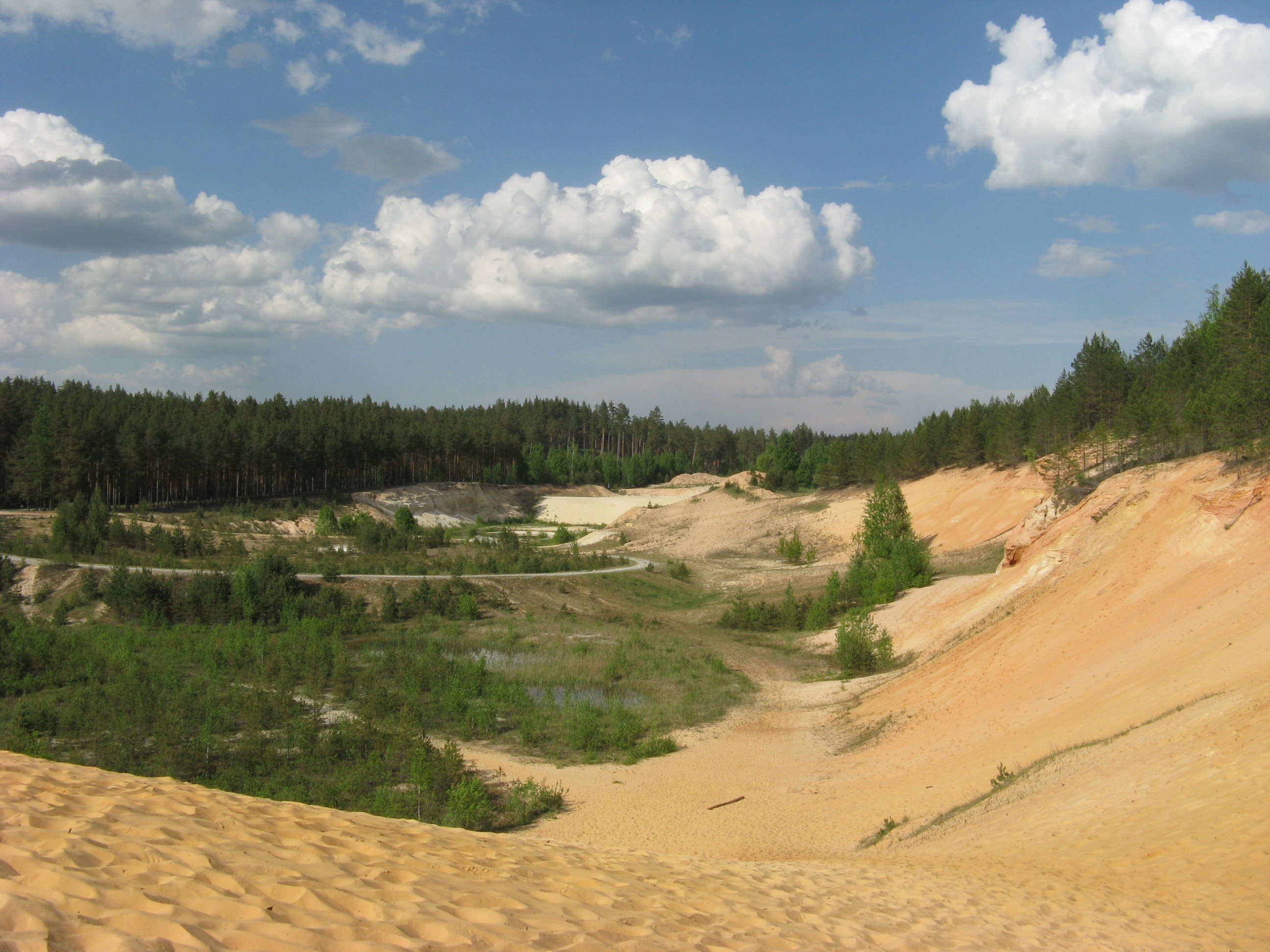 Piusa